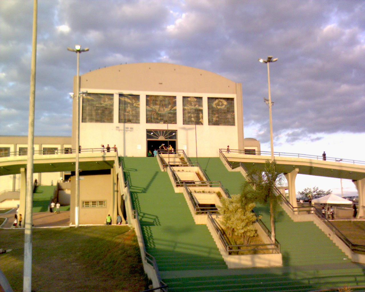 Trindade